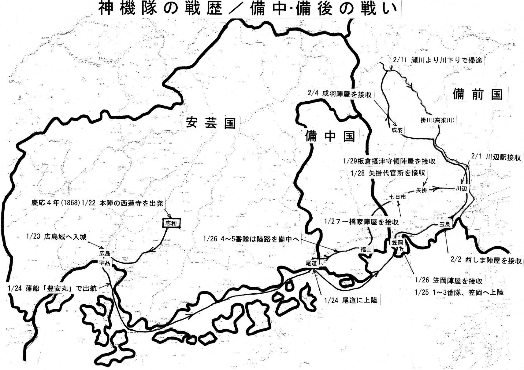 神機隊士の備中備後での戦歴